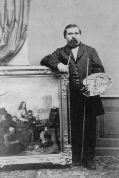 Portret van L.J. Bruna (1822-1906)